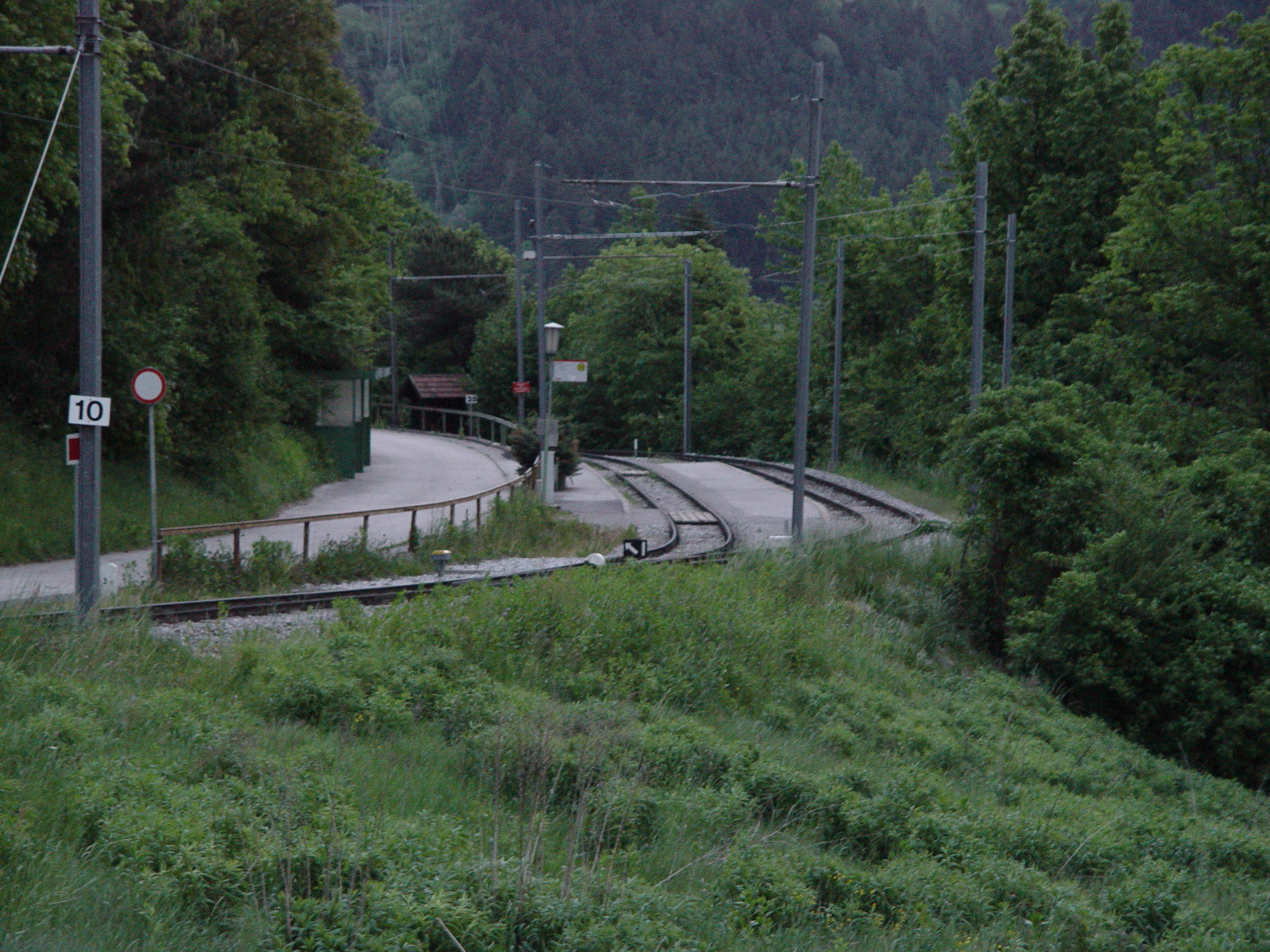 Bahnhof Hölltal der Stubaitalbahn